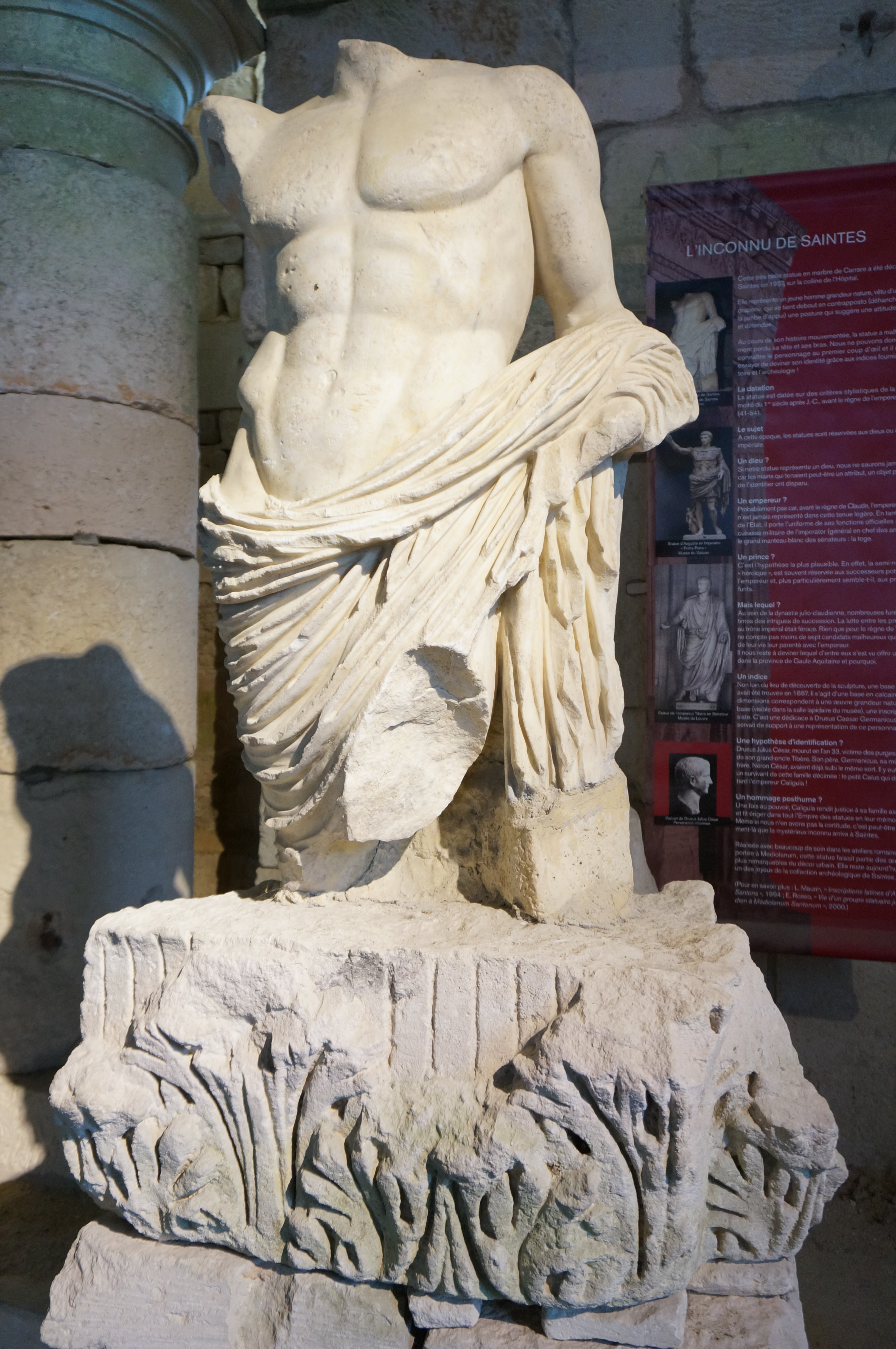 collection lapidaire de Saintes statue de marbre de Carrare, peut-être Drussus Caius.